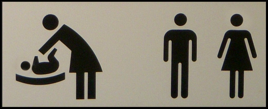 Dam- och herrtoalett med skötbord